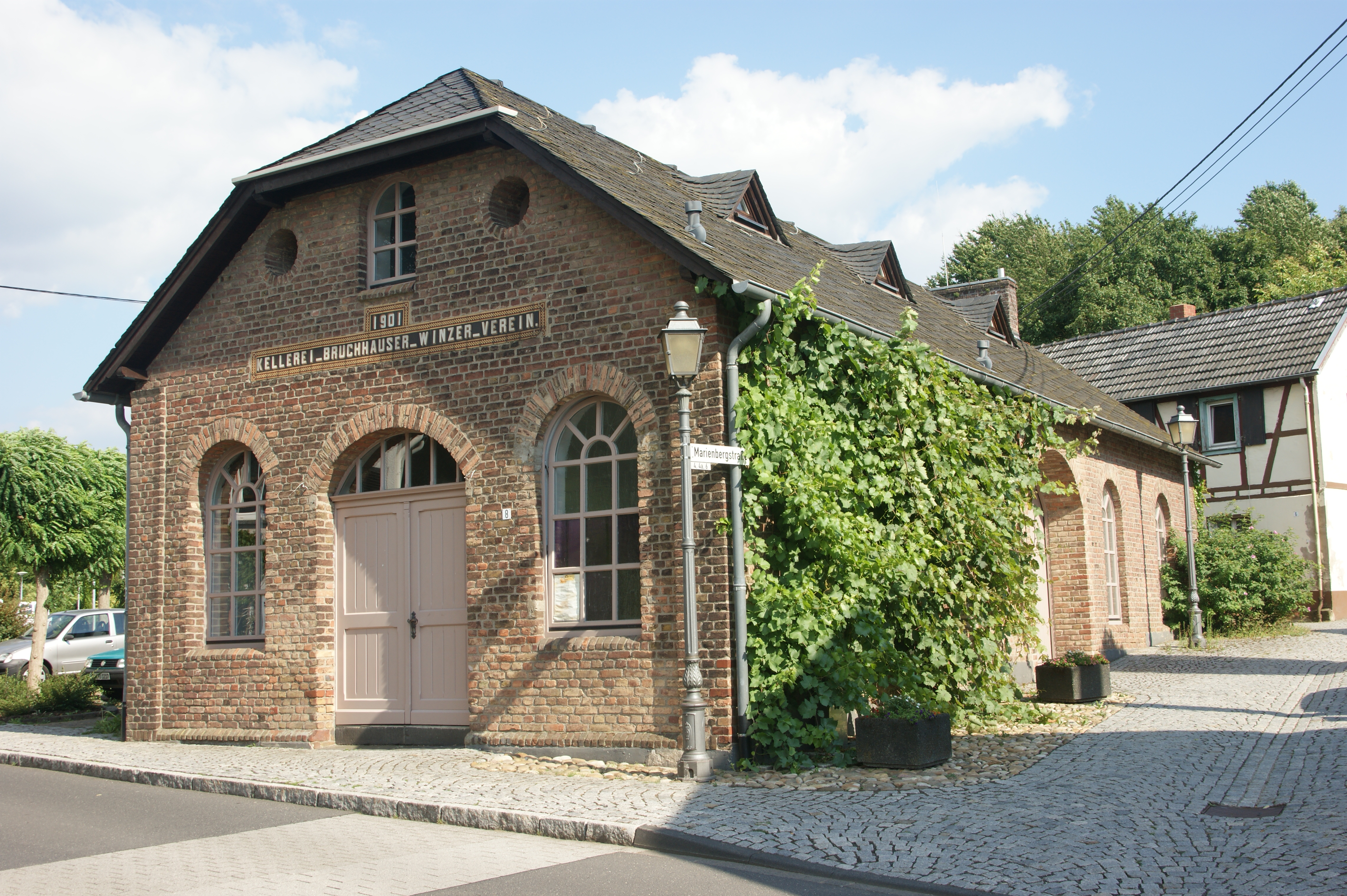 Kellerei in Bruchhausen